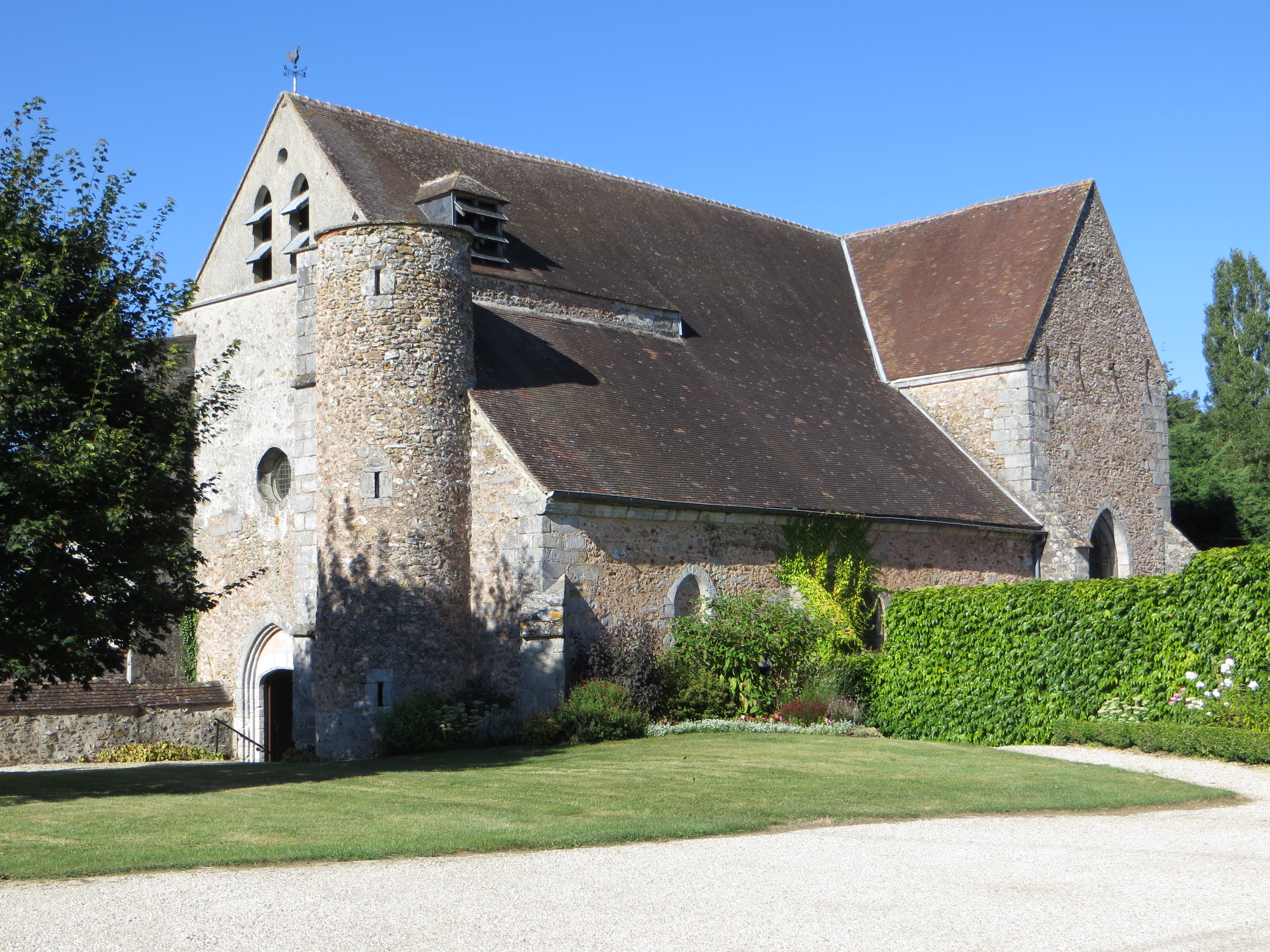 Vue générale de l'église